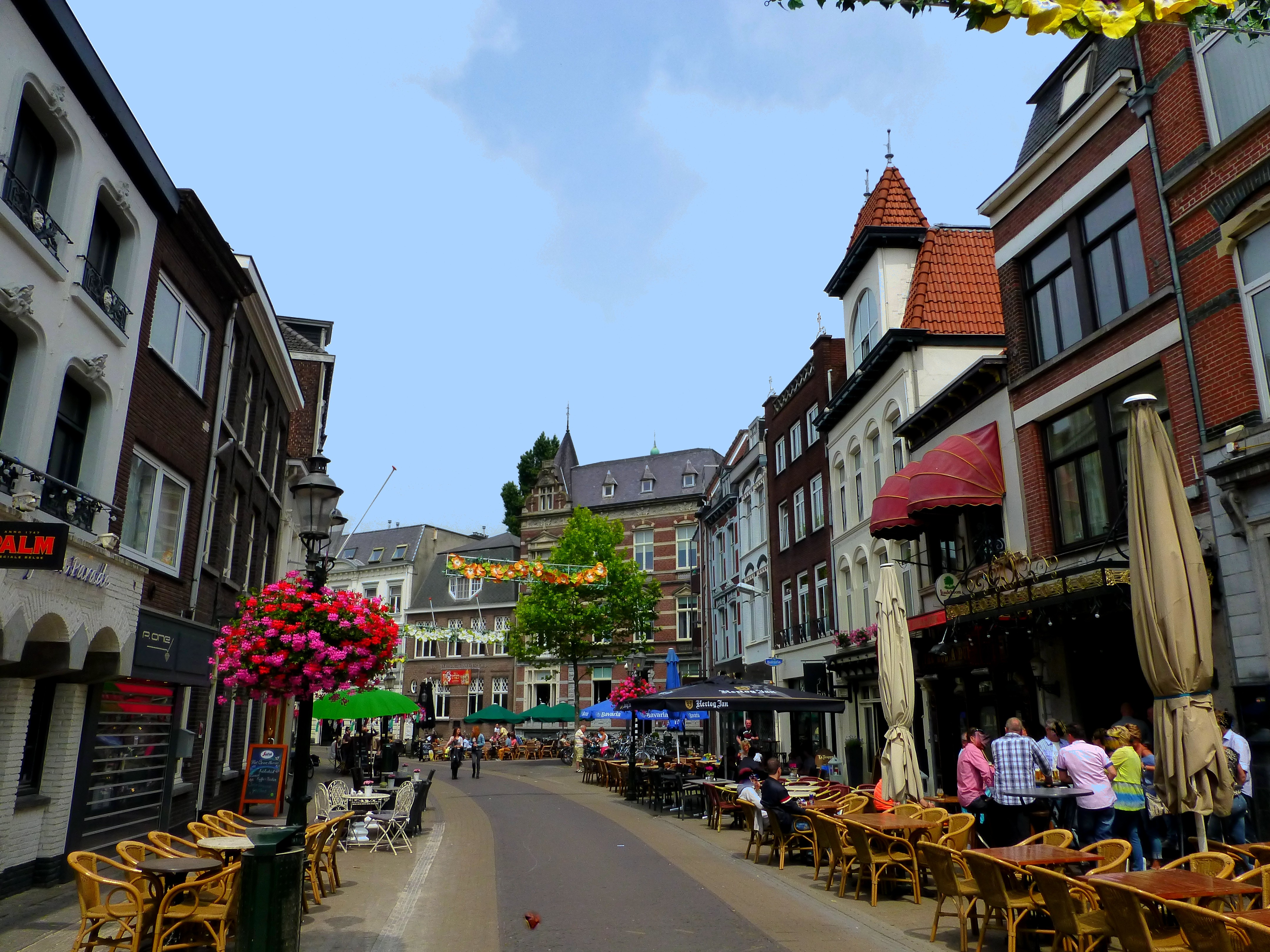 Zicht op een deel van de straat de Parade in het centrum van Venlo